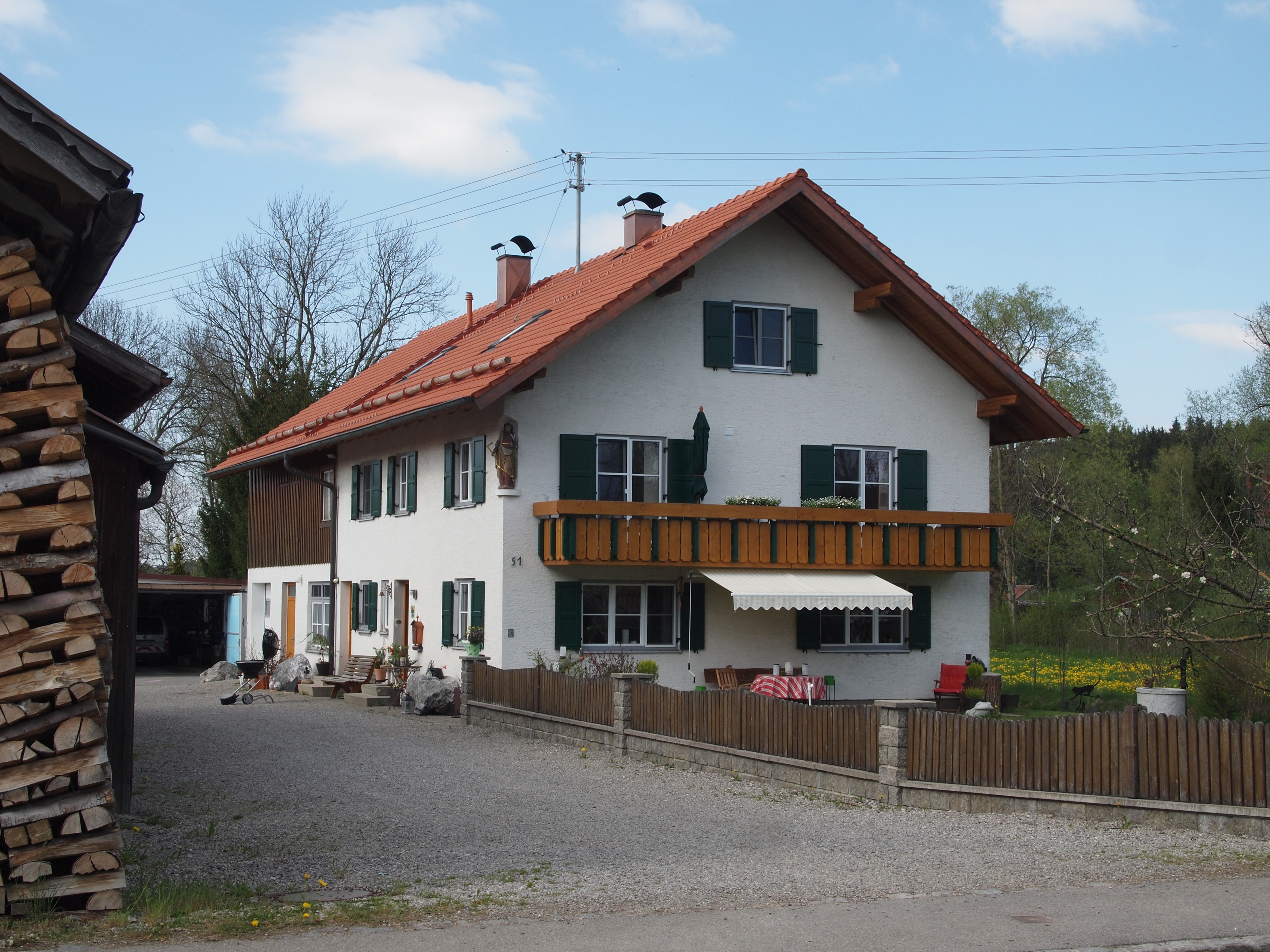 Hörmanshofen, Bernbacher Straße 51